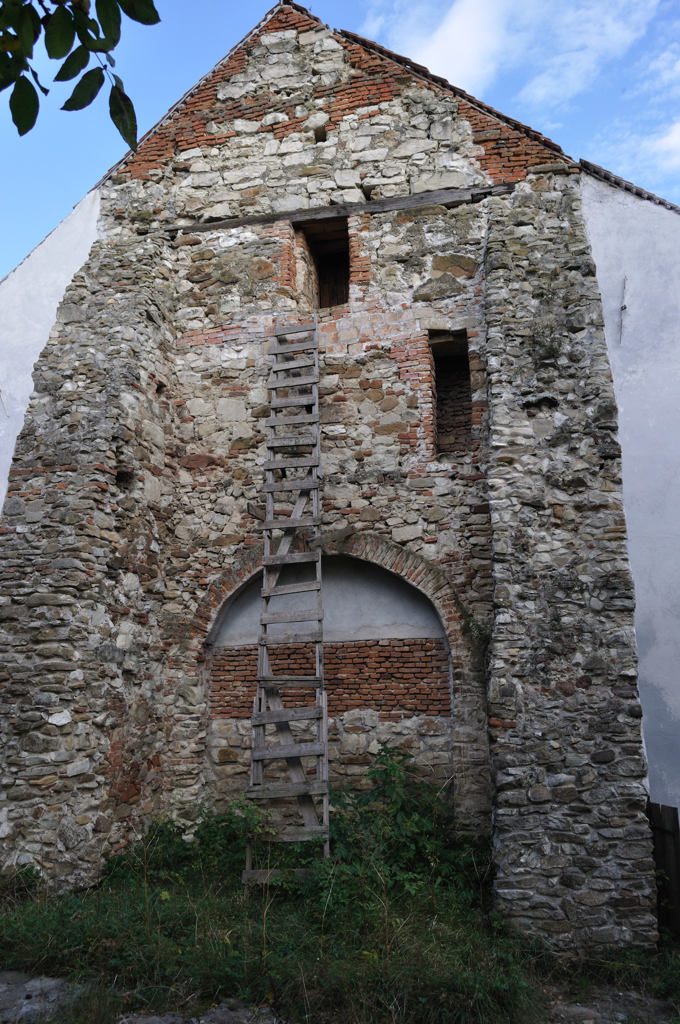 Biserica fortificată din Cenade, Alba